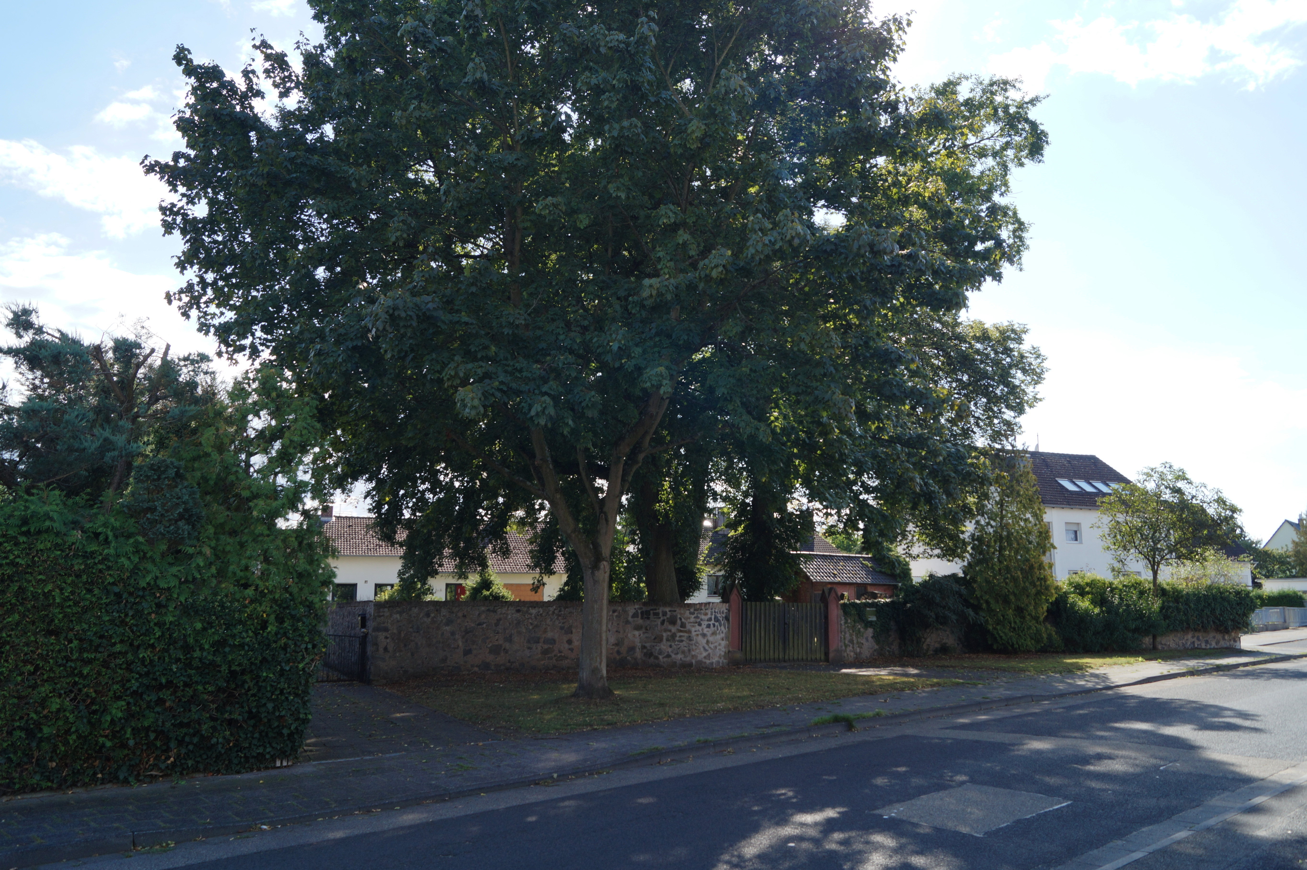 Neuer Jüdischer Friedhof Steinheim, Außenansicht von Nordosten.